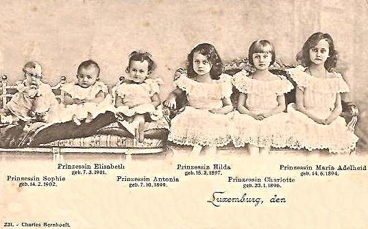 D'Duechtere vum Wëllem IV. vu Lëtzebuerg an der Maria Ana vu Bragança.